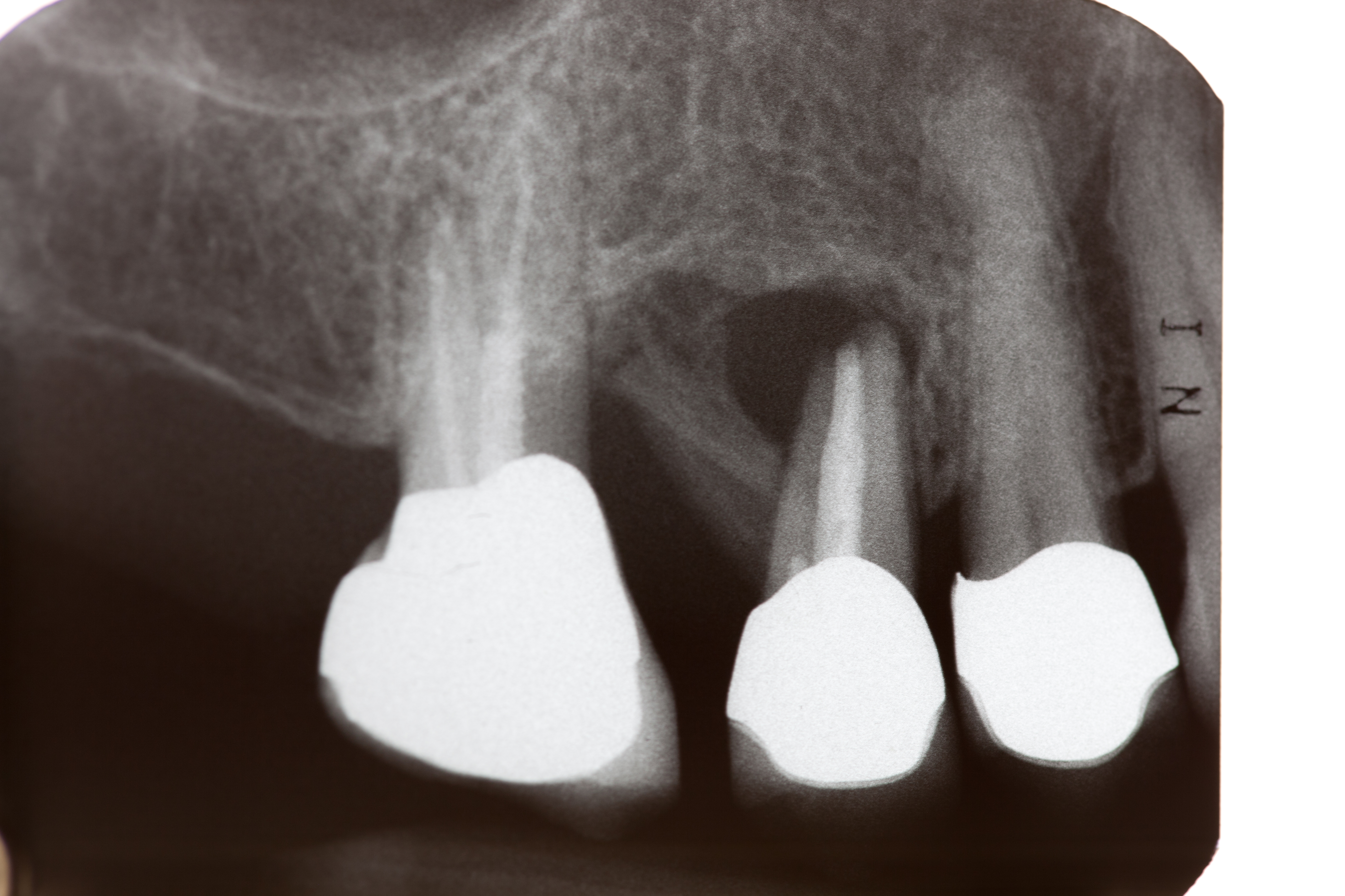 Röntgenbild der Zähne